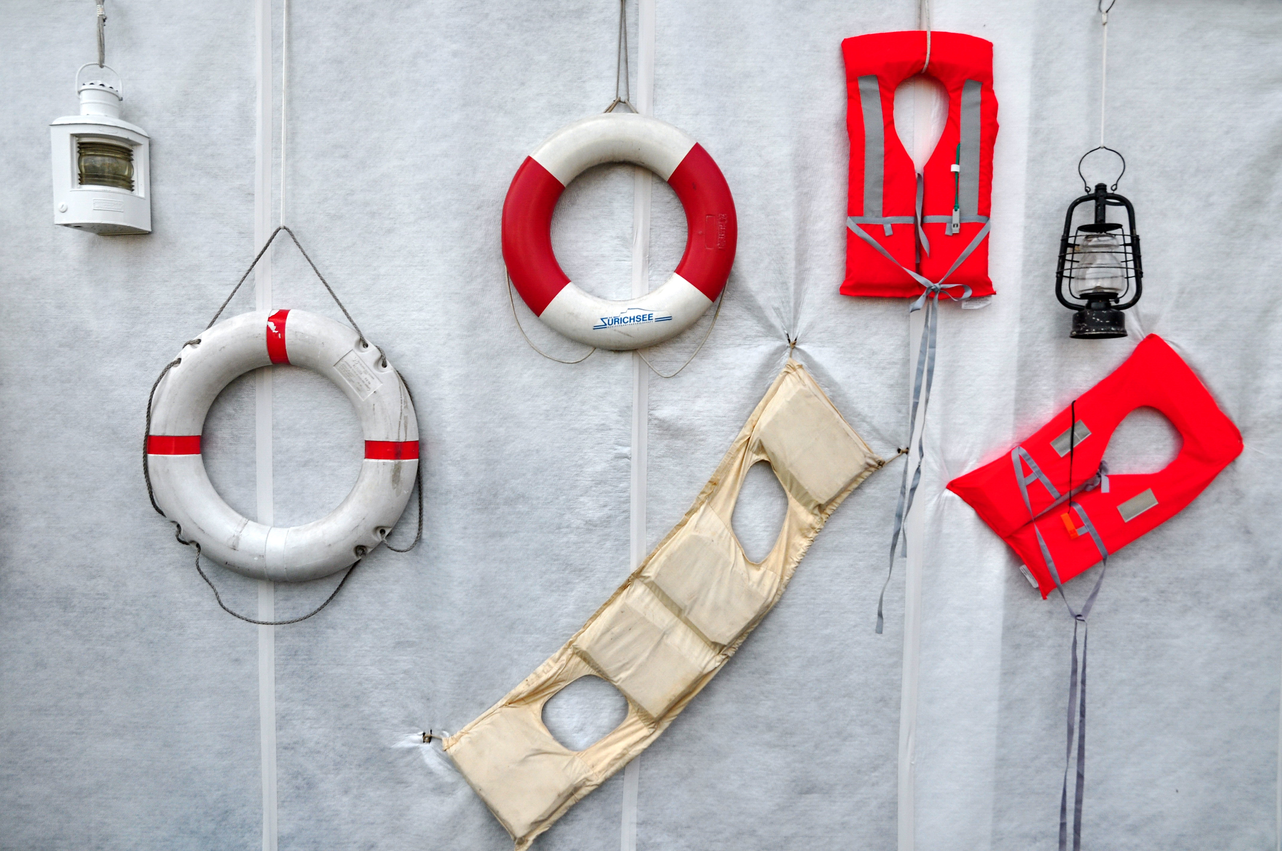 Tag der offenen Werft, Zürichsee-Schiffahrtsgesellschaft (ZSG) shipyard in Zürich-Wollishofen (Switzerland)